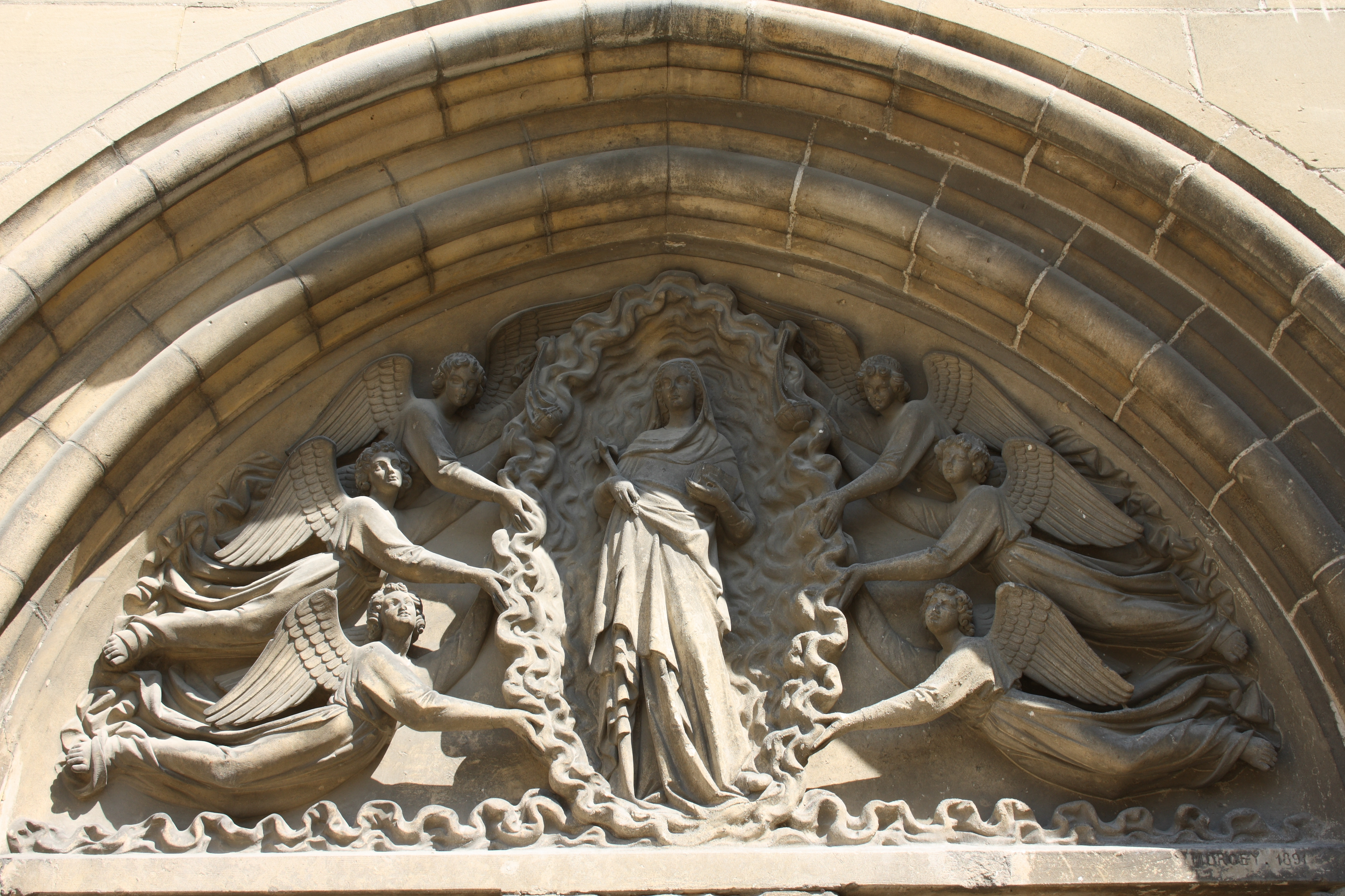 Katholische Pfarrkirche Notre-Dame-de-l'Assomption in Auvers-sur-Oise im Département Val d'Oise (Île de France), erbaut im 12./13. Jahrhundert, Tympanon am Südportal von 1891, Darstellung: Mariä Himmelfahrt